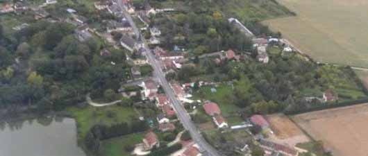 Vue aérienne d'Aillant-sur-Milleron, Loiret, Centre, France